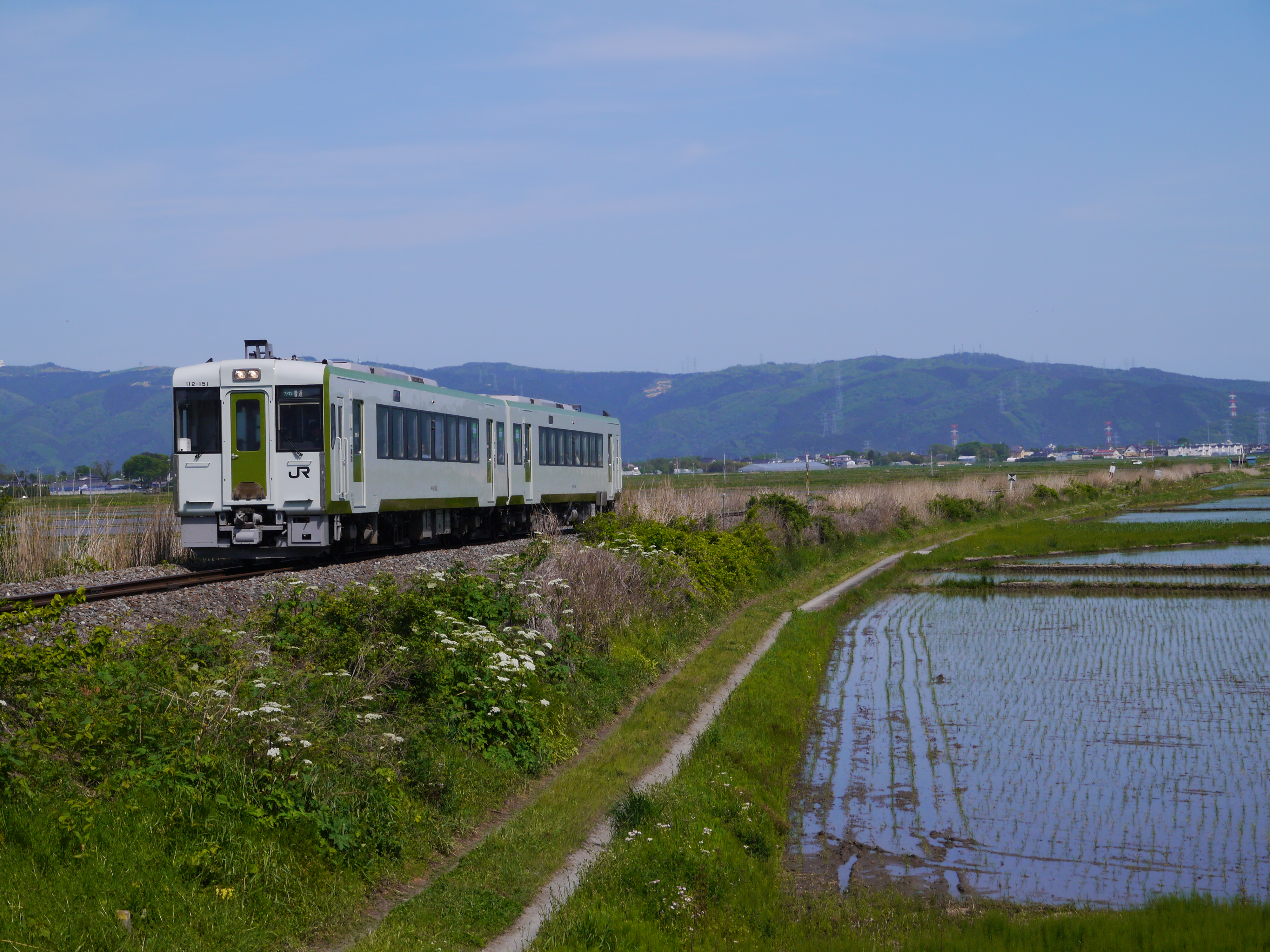 JR石巻線を走るキハ110形車両（佳景山～鹿又）